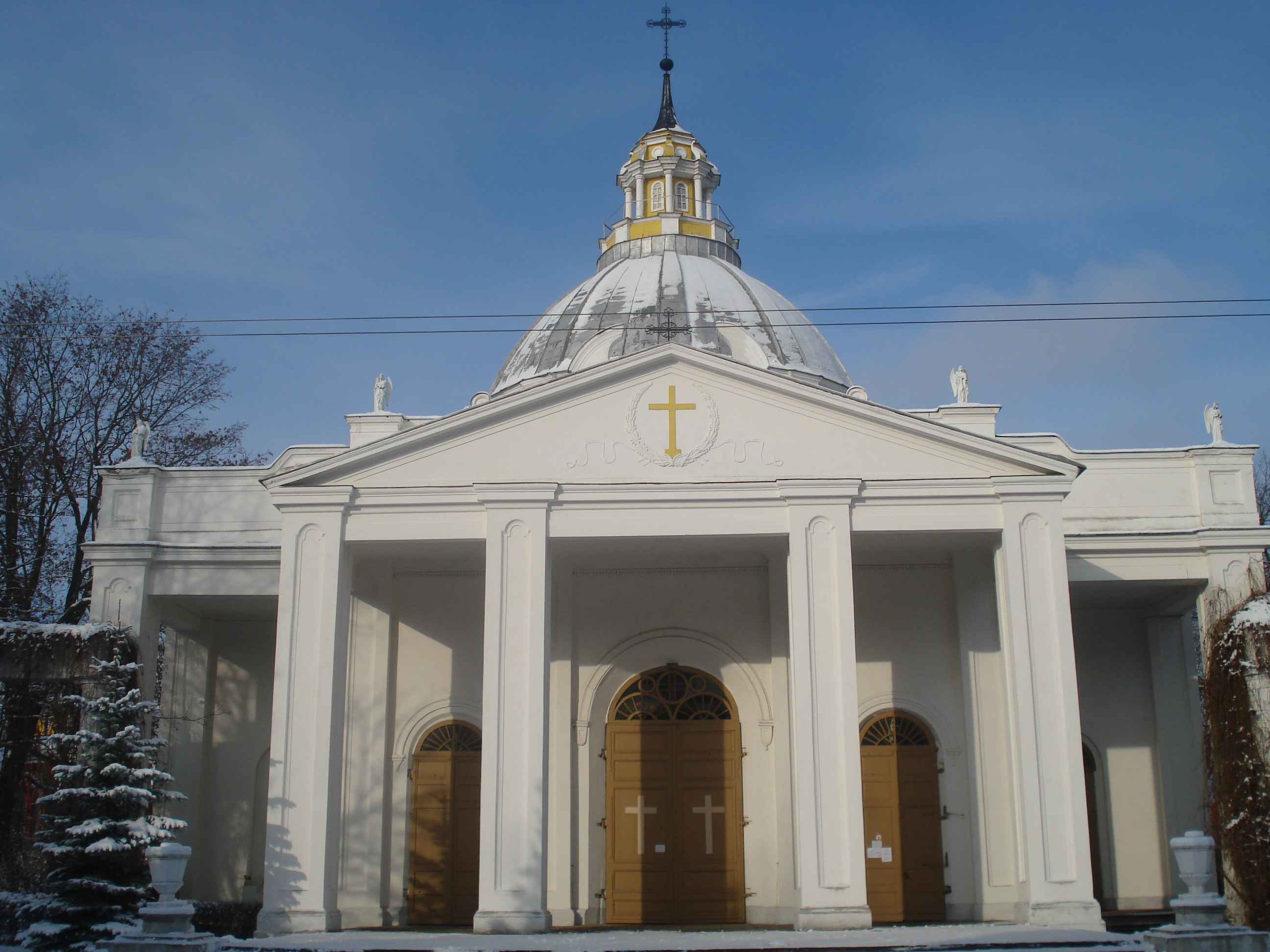 Roman Catholic Church of Saint Peter in Daugavpils (Sv. Pētera Romas katoļu baznīca). Rigas ielā 39. 1848; rebuilt 1924. Костёл св. Петра. Построен в 1848 году, в 1924–1934 годах перестроен под руководством архитектора Козловского. Ригас 39